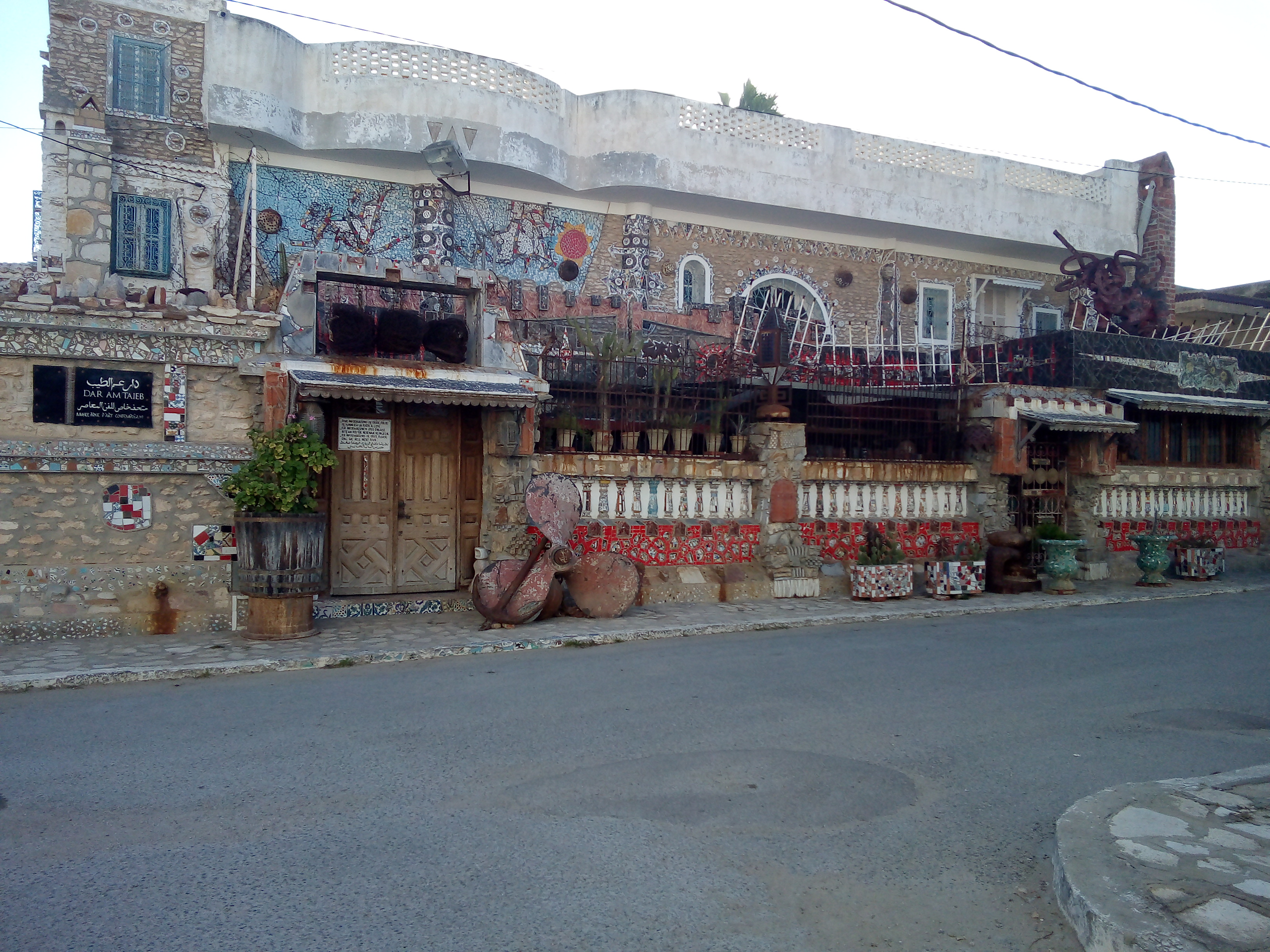 منزل حوله صاحبه الي متحف